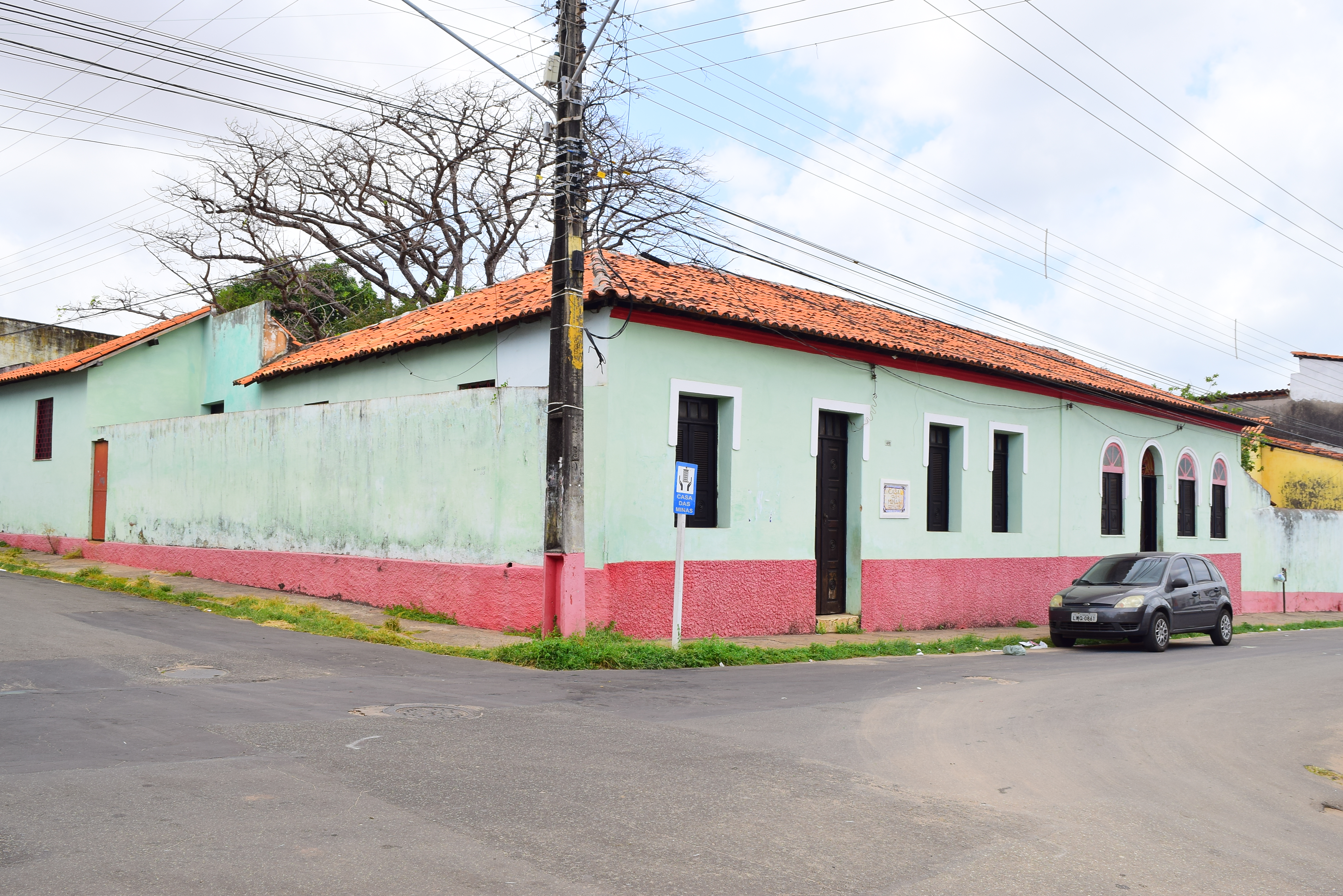 Terreiro Casa das Minas Jeje, situado na Rua de São Pantaleão nº 857 e 857A.